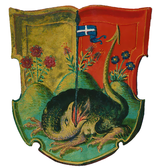 Das Wappen des Stadtfleckens Moritzberg in Hildesheim. PNG-Version. Cleaned-up.